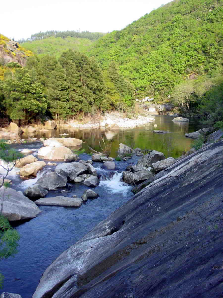 Río Tambre - Galicia - Spain